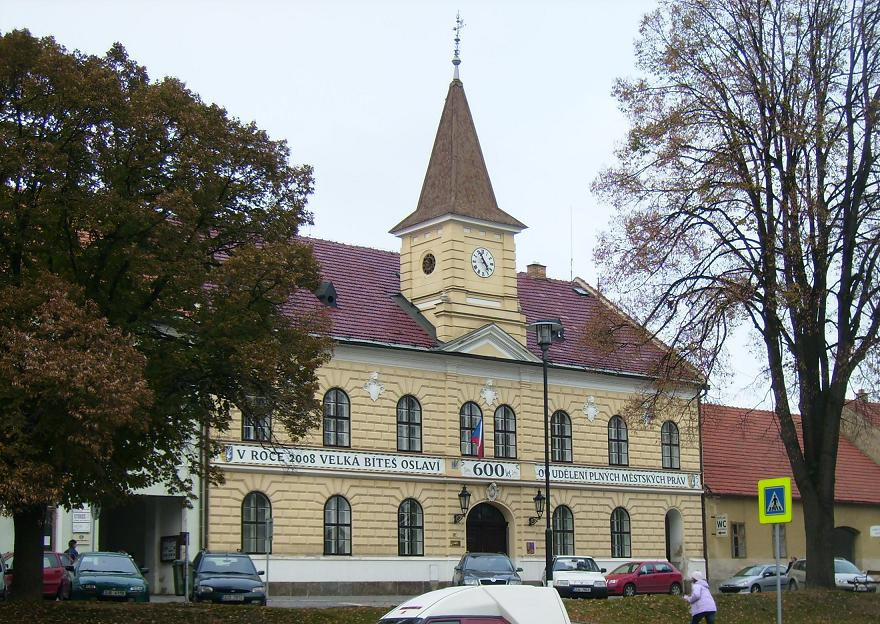 Radnice ve Velké Bíteši